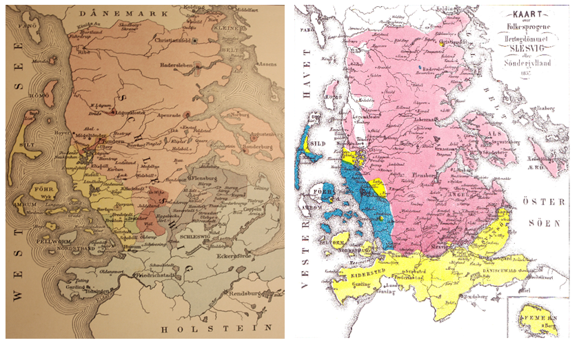 Gegenüberstellung der Karten über die Sprachverhältnisse in Schleswig/Sønderjylland des preußischen Majors und Kartographen Franz Heinrich Julius Geerz von 1838 (vom Betrachter links) und des dänischen Historikers Carl Ferdinand Allen von 1858 (vom Betrachter rechts).